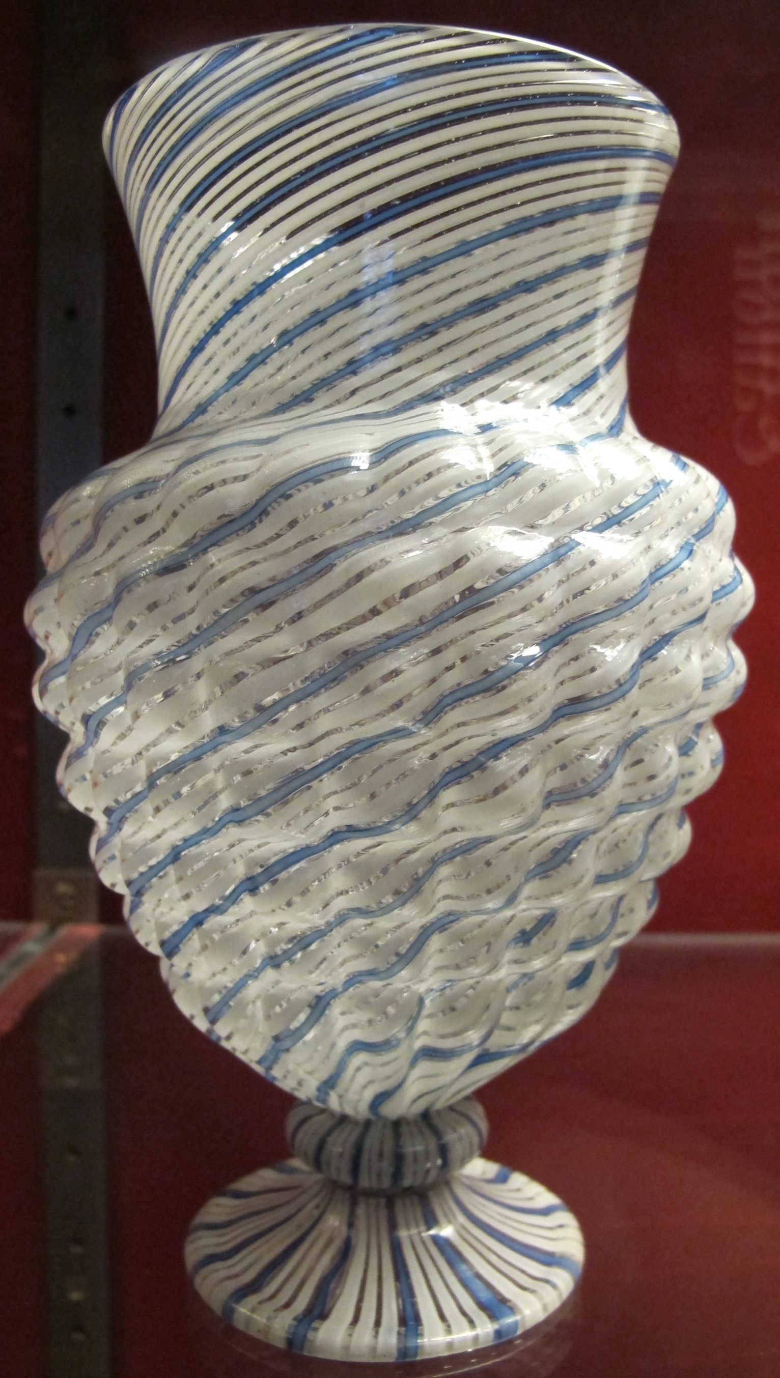 Venezia o façon de venise, vaso, 1550-1600 ca.